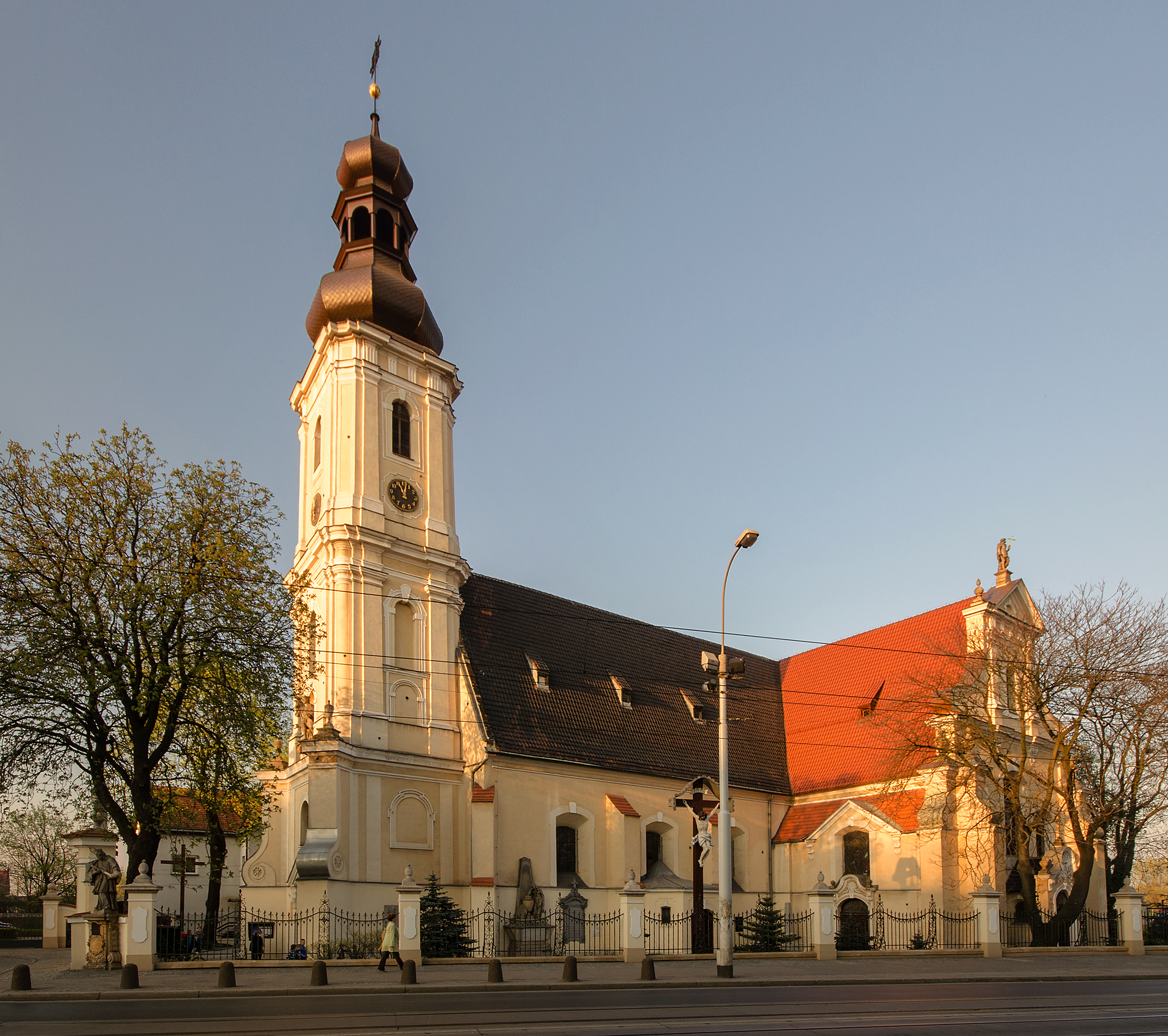 Wrocław, kościół par. p.w. św. Maurycego, 2 poł. XIII, 1723, 1897-1899